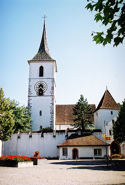 Die Wehrkirche St. Arbogast in Muttenz, Schweiz